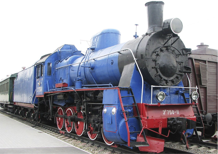 Паровоз построен в 1944 году Коломенским паровозостроительным заводом